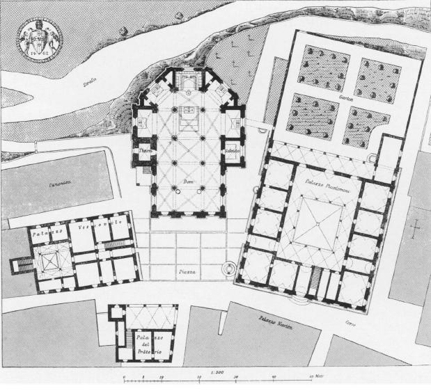 grondplan van piazza Pio II te Pienza